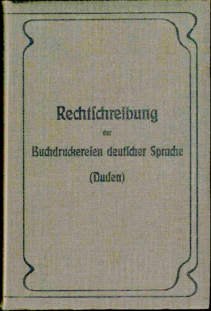 Rechtschreibung der Buchdruckereien deutscher Sprache Auf Anregung und unter Mitwirkung des Deutschen Buchdruckervereins, des Reichsverbandes Österreichischer Buchdruckereibesitzer und des Vereins Schweizerischer BuchdruckereibesitzerBibliographisches Institut